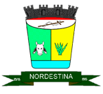 Brasão_Nordestina_BA.gif